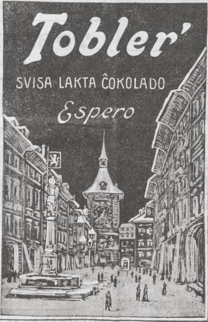 Esperanto reklamo por Tobler ĉokolado